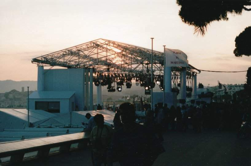 Studio Canal + sur la palge du Martinez pendant le Festival de Cannes